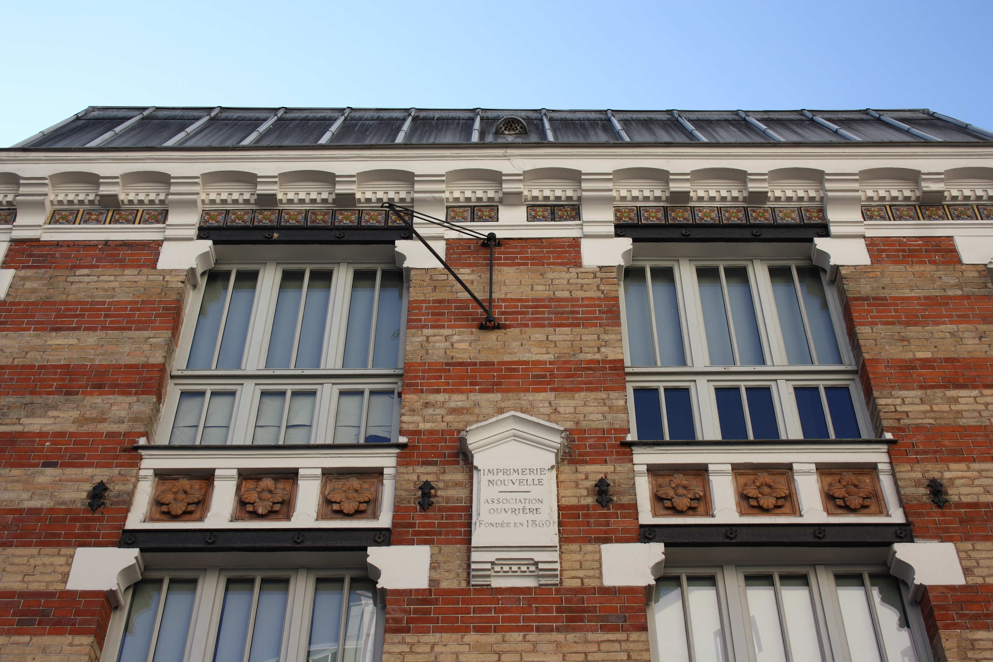 Hinterhaus 9, 11 rue Cadet in Paris (9. Arrondissement), ehemalige Druckerei